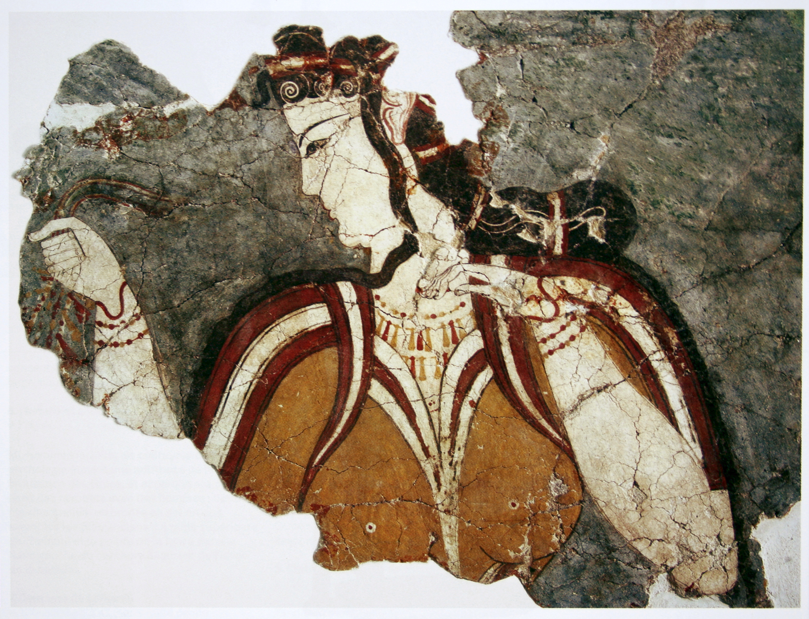 La Dame de Mycènes, fresque, hauteur : 53 cm. L'expression sérieuse et pensive de la déesse révèle la solennité du moment, alors qu'elle accepte une offrande — un collier qu'elle tient serré dans sa main droite. Elle porte un corsage à manches courtes sur un chemisier qui souligne sa poitrine. Sa coiffure complexe retient l'attention de même que ses riches bijoux — bracelets et colliers.